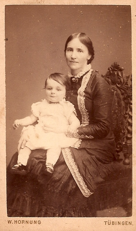 Sophie Bülow geb. Haug (* 4. September 1843 in Tübingen; † 24. Juni 1937 in Tübingen), Ehefrau von Oskar Bülow mit Sohn Friedrich